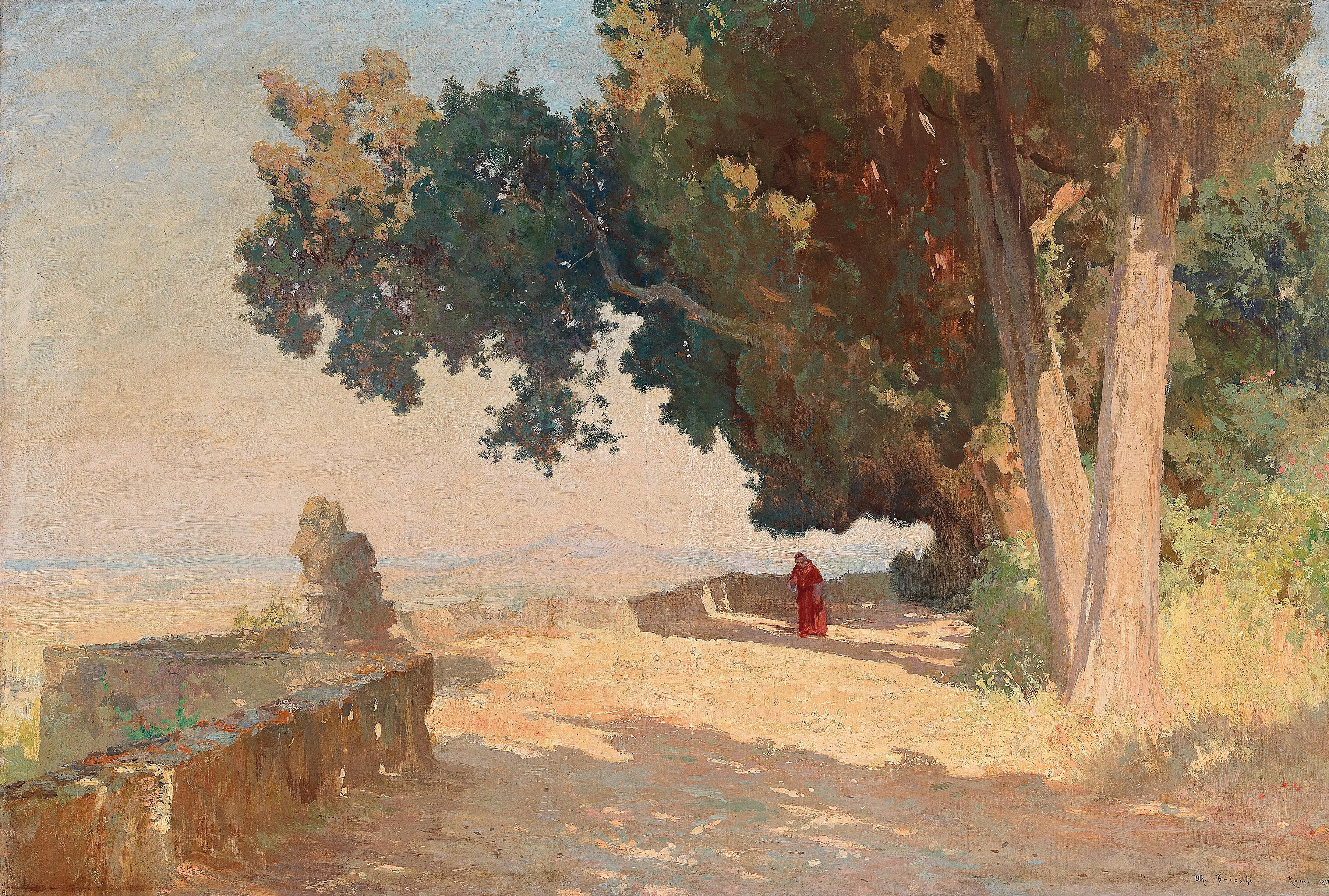 Morgensonne, Villa d'Este, Rom, signiert, datiert und bezeichnet Oth. Brioschi Roma 1912, Öl auf Leinwand, 55 x 82 cm